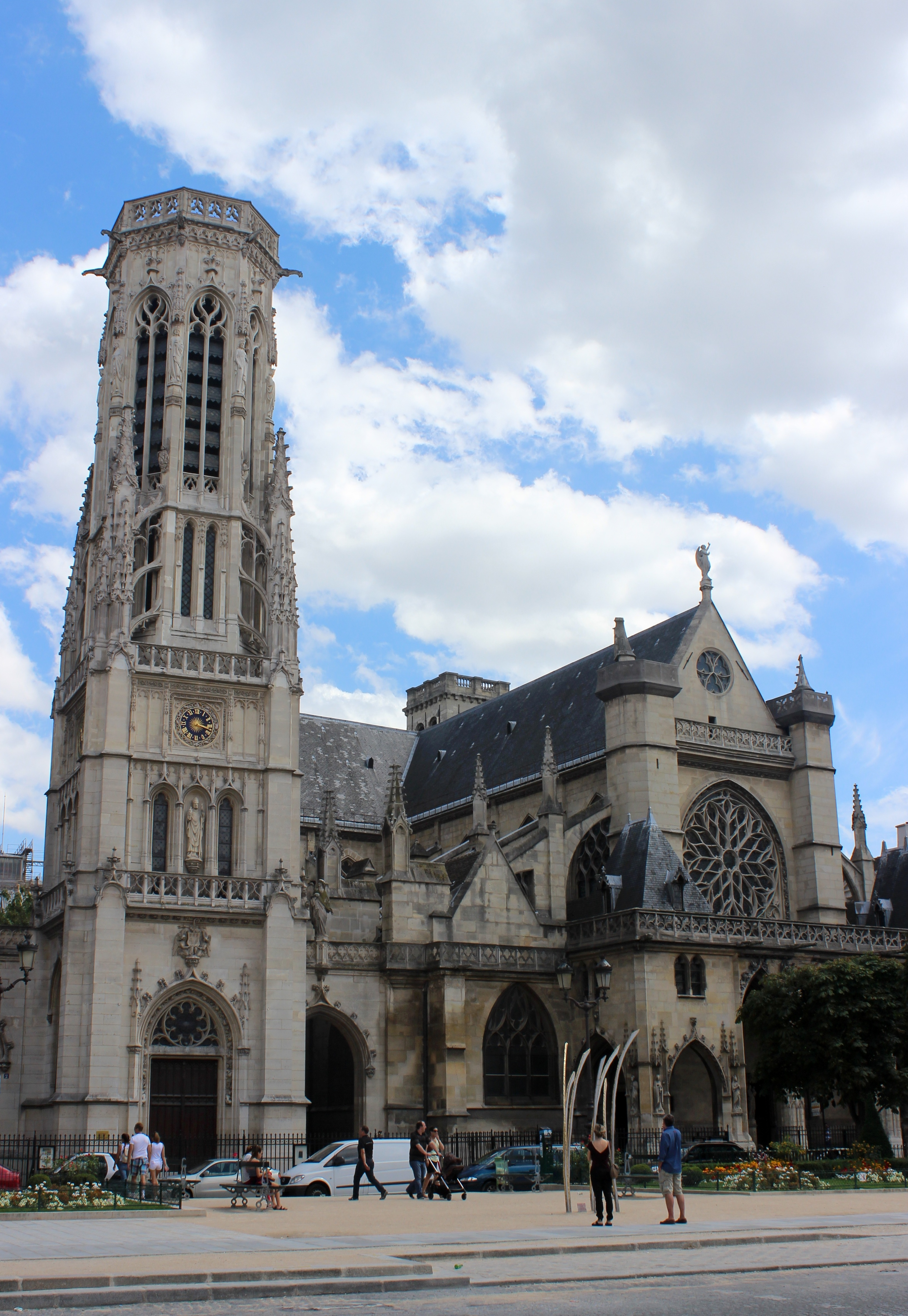 París. Saint Germain l'Auxerrois. Exterior.